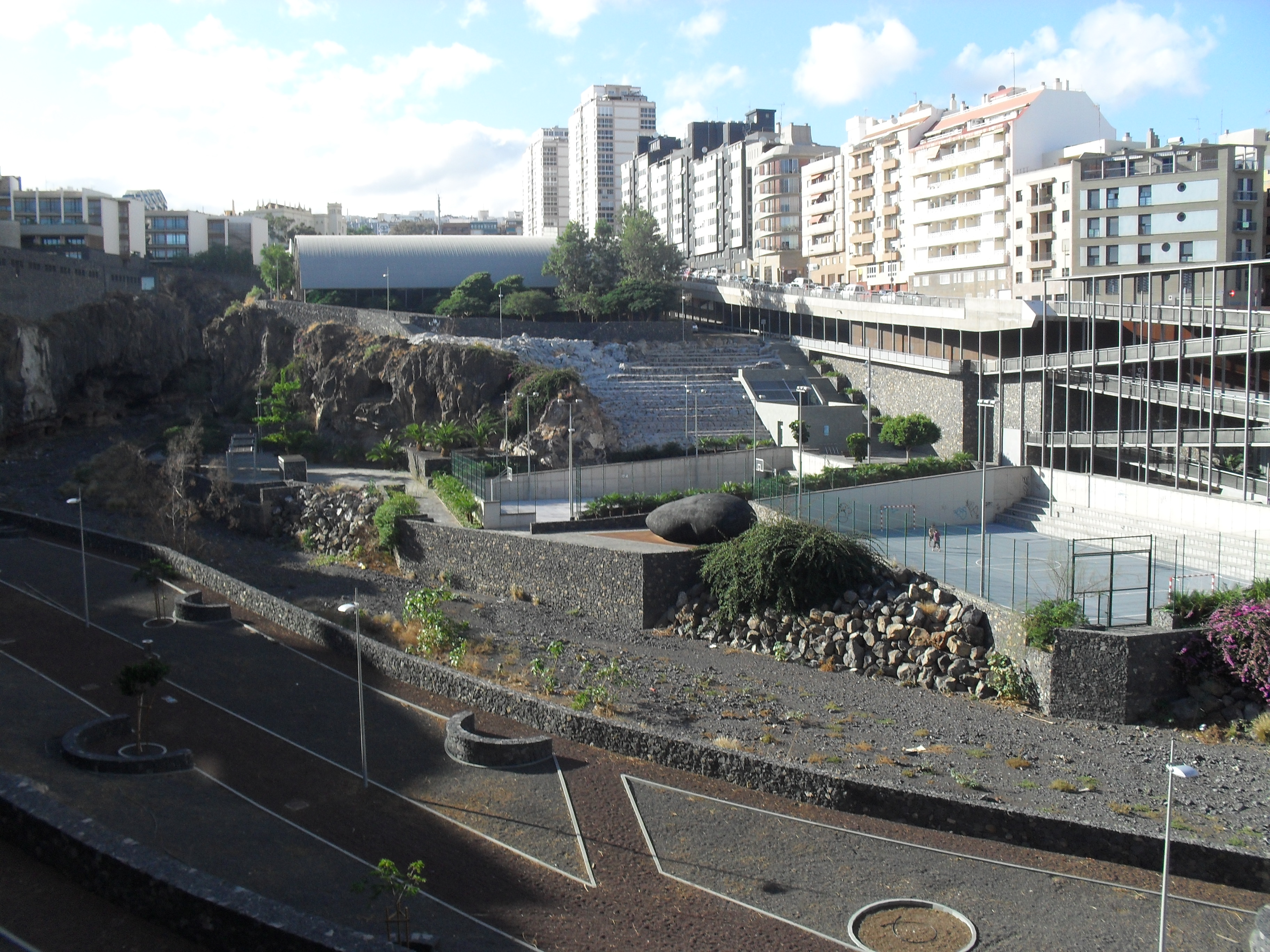 Barranco en Santa Cruz de Tenerife. En primer término, Polideportivo de Barranco de Santos. Al fondo, Pabellón Municipal Ana Bautista.